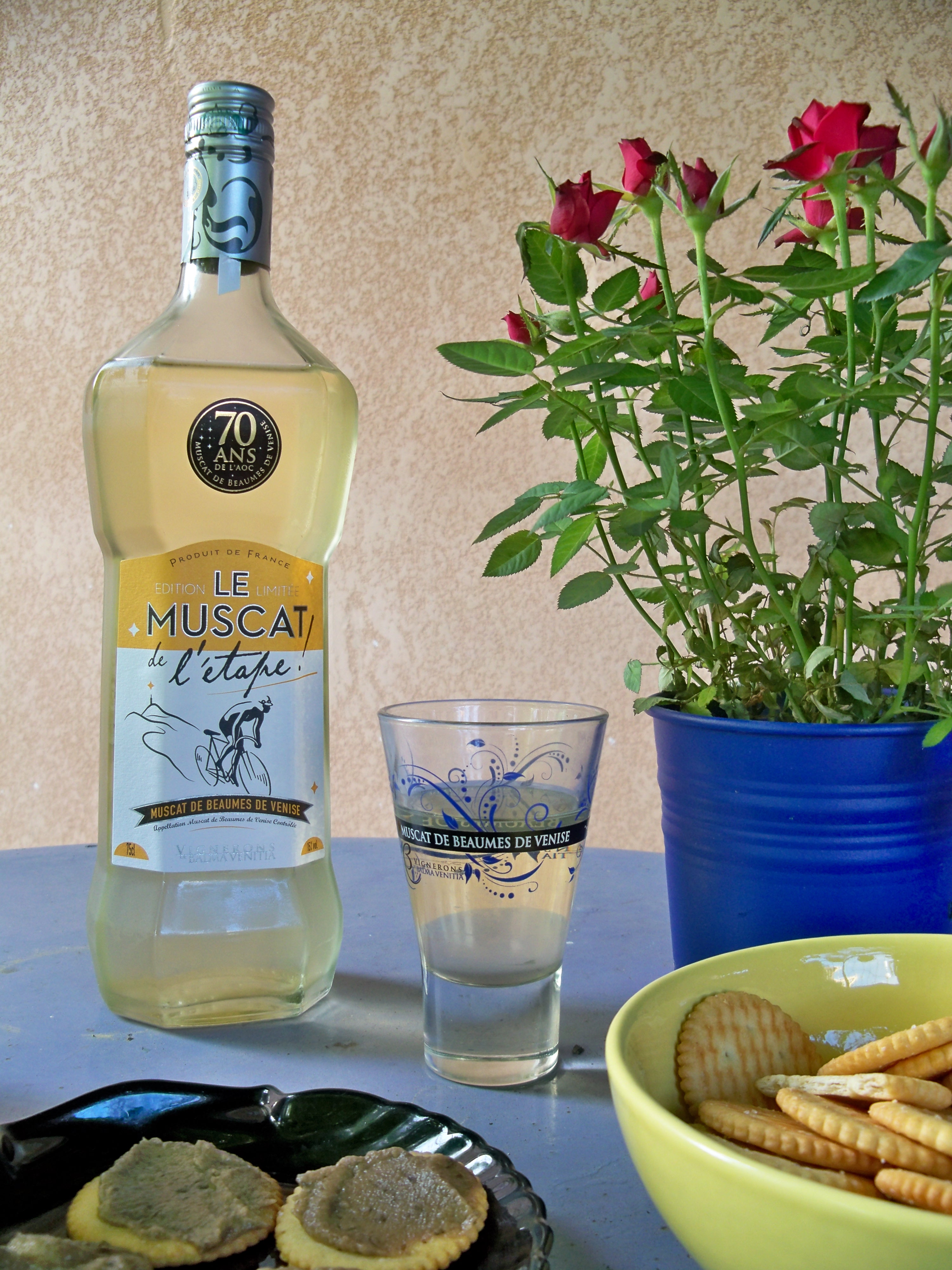 bouteille de Beaumes de Venise - Muscat de l'étape, en hommage du 100ème tour de France